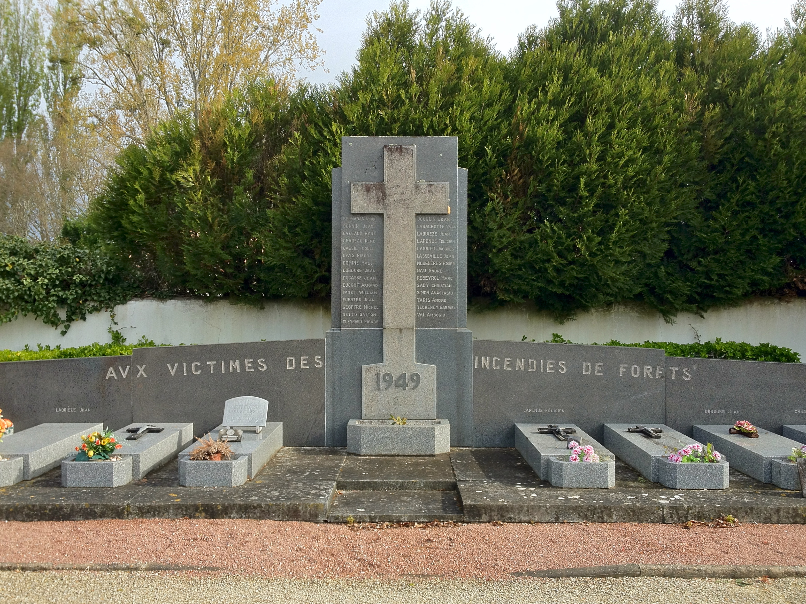 Monument aux victimes de Canéjan mortes dans l'incendie de 1949